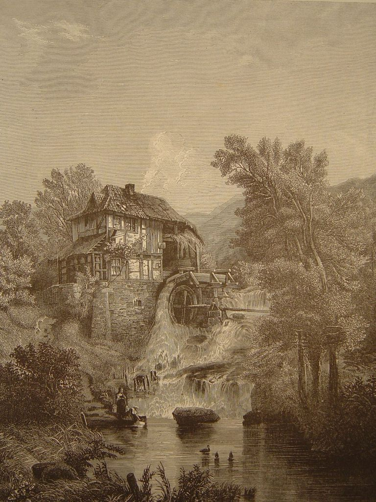 au bord de l'eau par Heilbuth